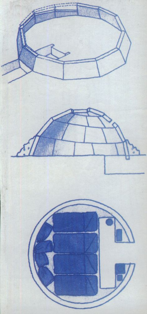 Igloo diagram